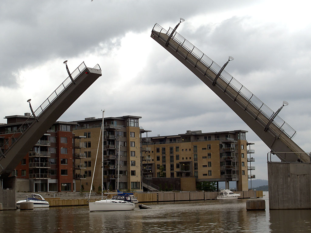 Bridge in Tønsberg